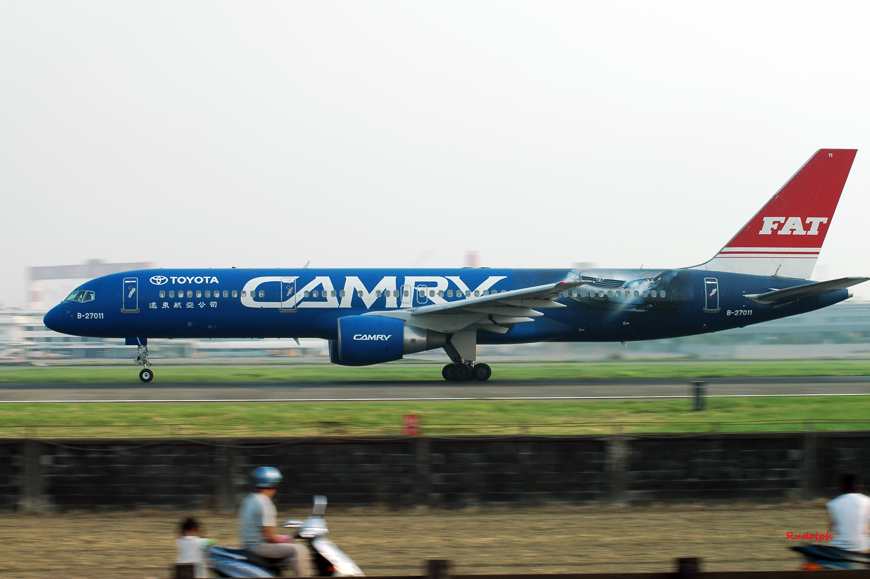 遠東航空已退役之波音757-200 TOYOTA CAMRY彩繪機，機號B-27011，攝於2005年9月12日。